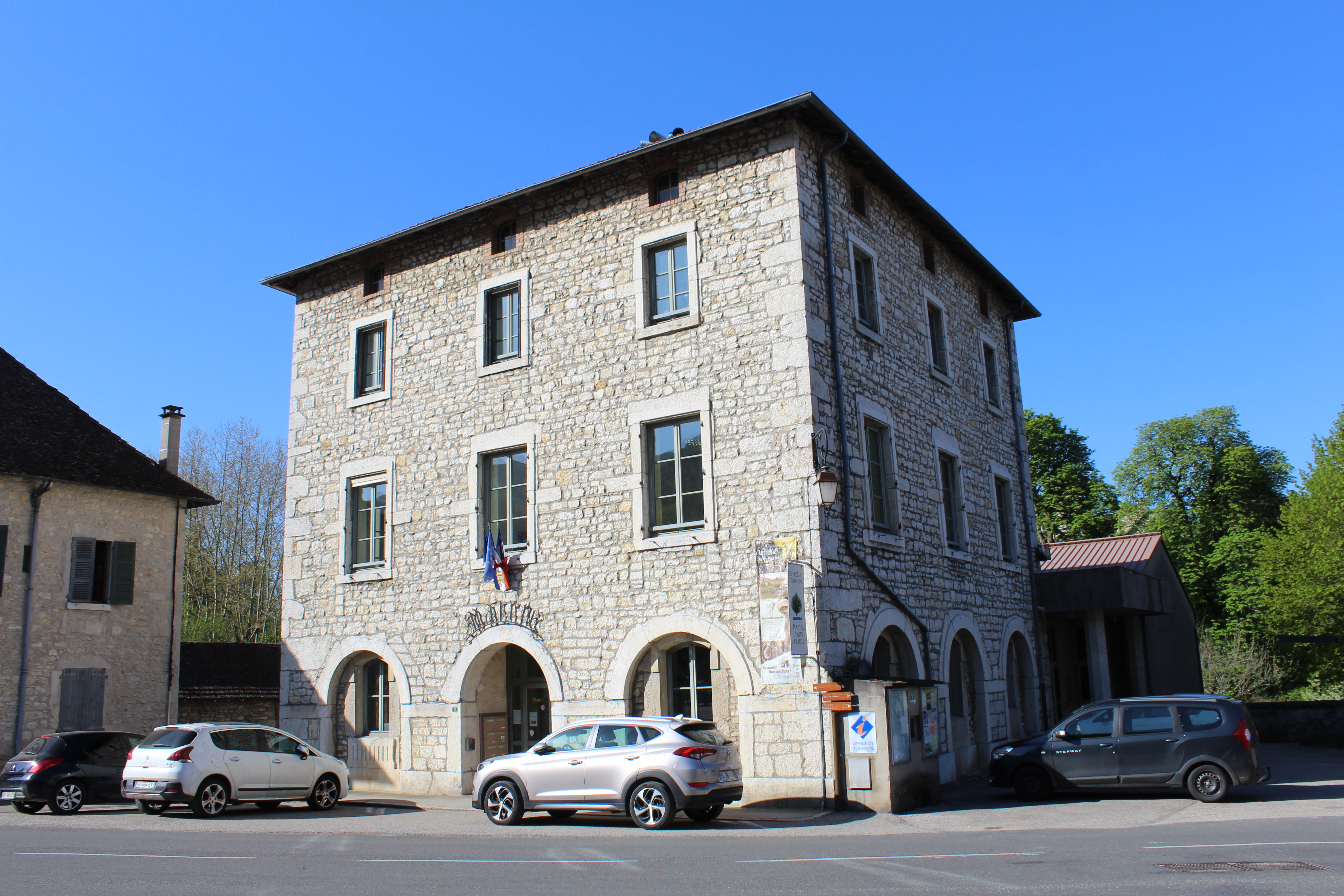 Mairie de Lhuis.